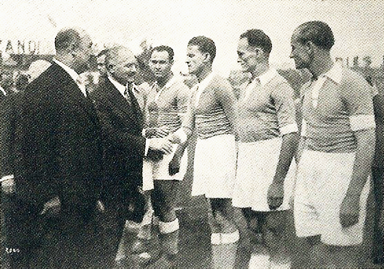 RC Strasbourg avant la finale de Coupe de France 1937 (Charles Belling, Albert Lebrun, Elek Schwartz, Hummenberger, Henri Roessler, Fritz Keller)